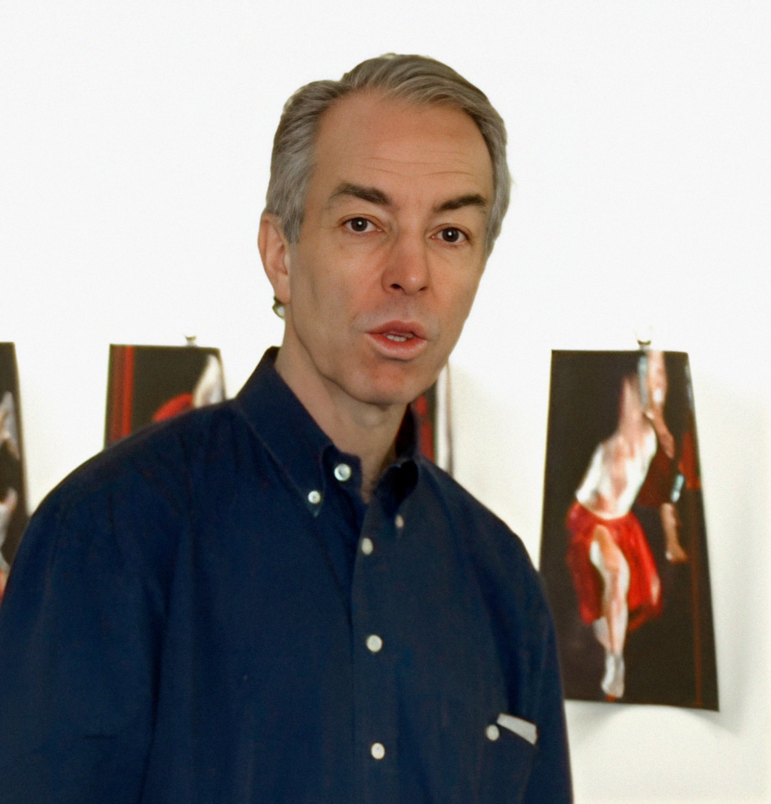 Anders Mattsson på en vernissage i Malmö 2005.